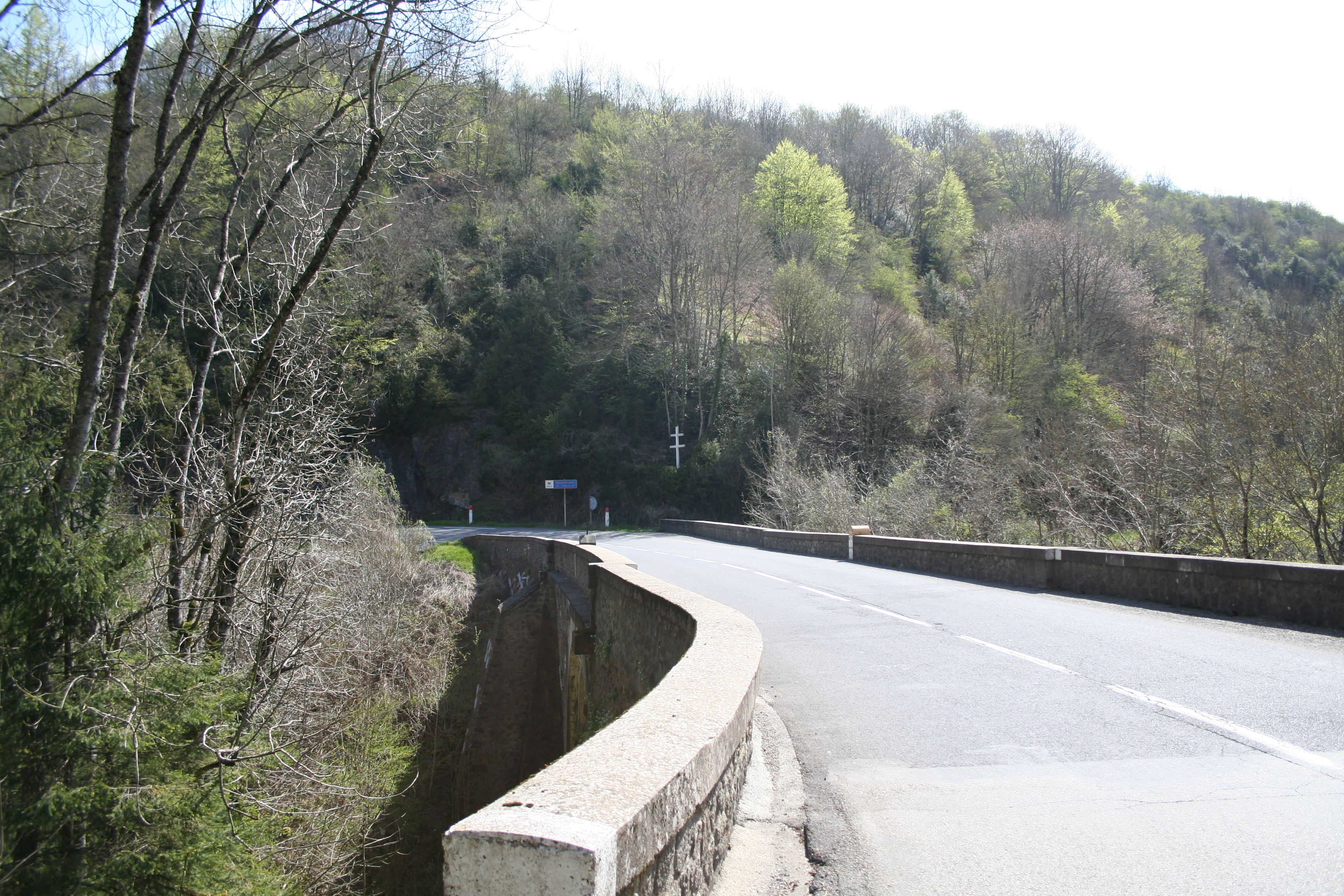 Pont de la Mouline sur le Dourdou emprunté par l'ancienne Route nationale 622, marquant la limite entre Castanet-le-Haut (Hérault) et Murat-sur-Vèbre (Tarn) (au premier plan). Le 23 August 1944 eut lieu un combat entre le Corps Franc de la Montagne Noire et une colonne allemande. Neuf maquisards perdirent la vie lors de ce combat et plusieurs allemands.